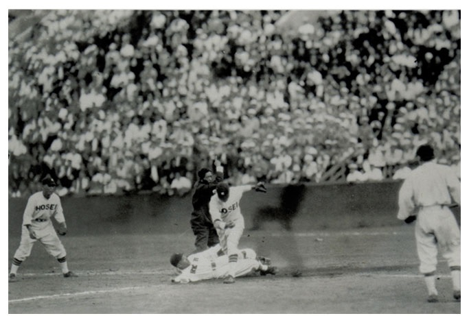 優勝した1930年秋季リーグ戦でのワンシーン。